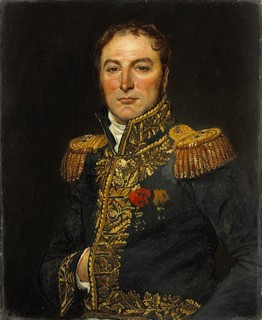 Portrait du général baron Claude Marie Meunier (1770-1846), gendre de Jacques-Louis David